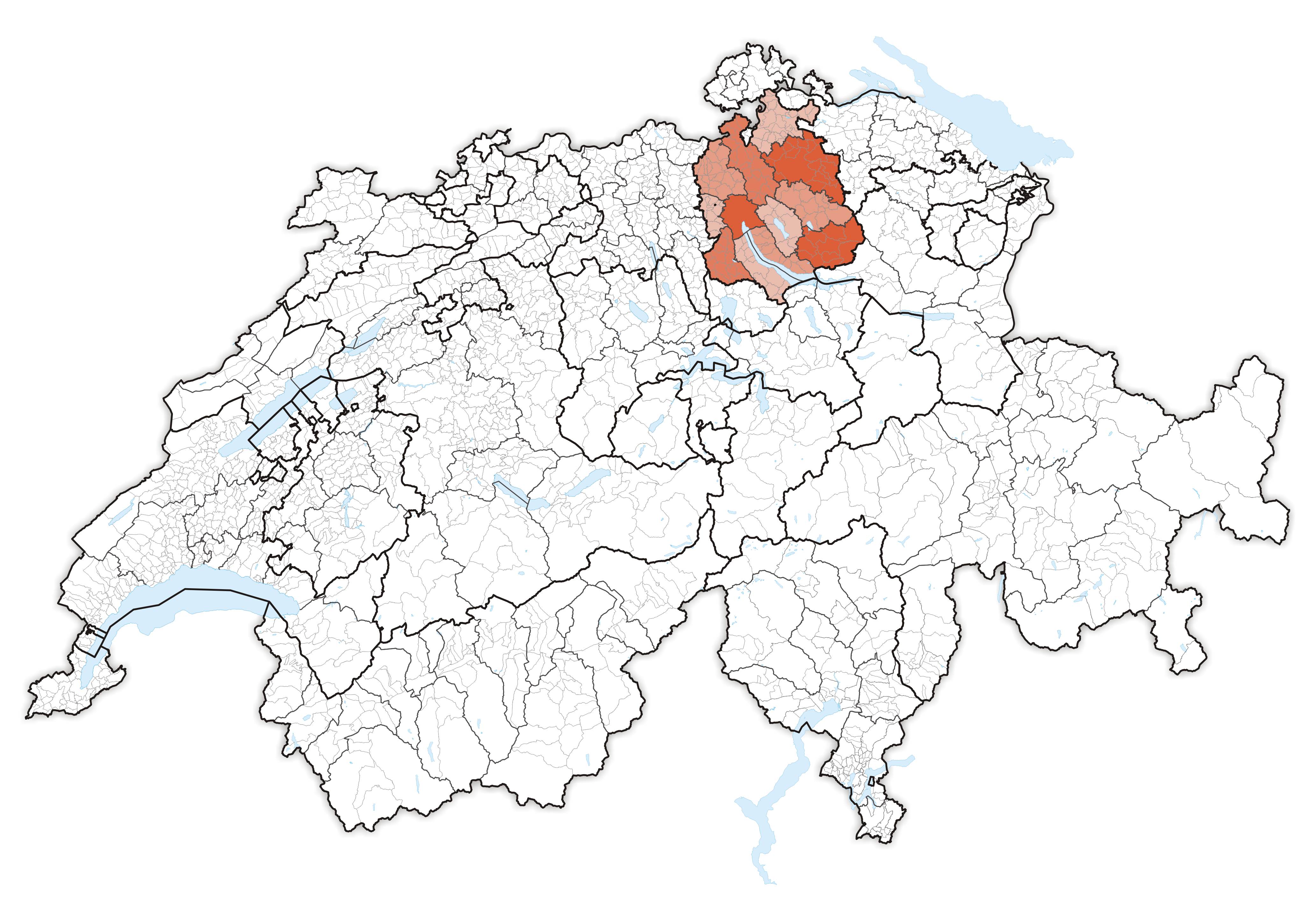 Canton Zürich